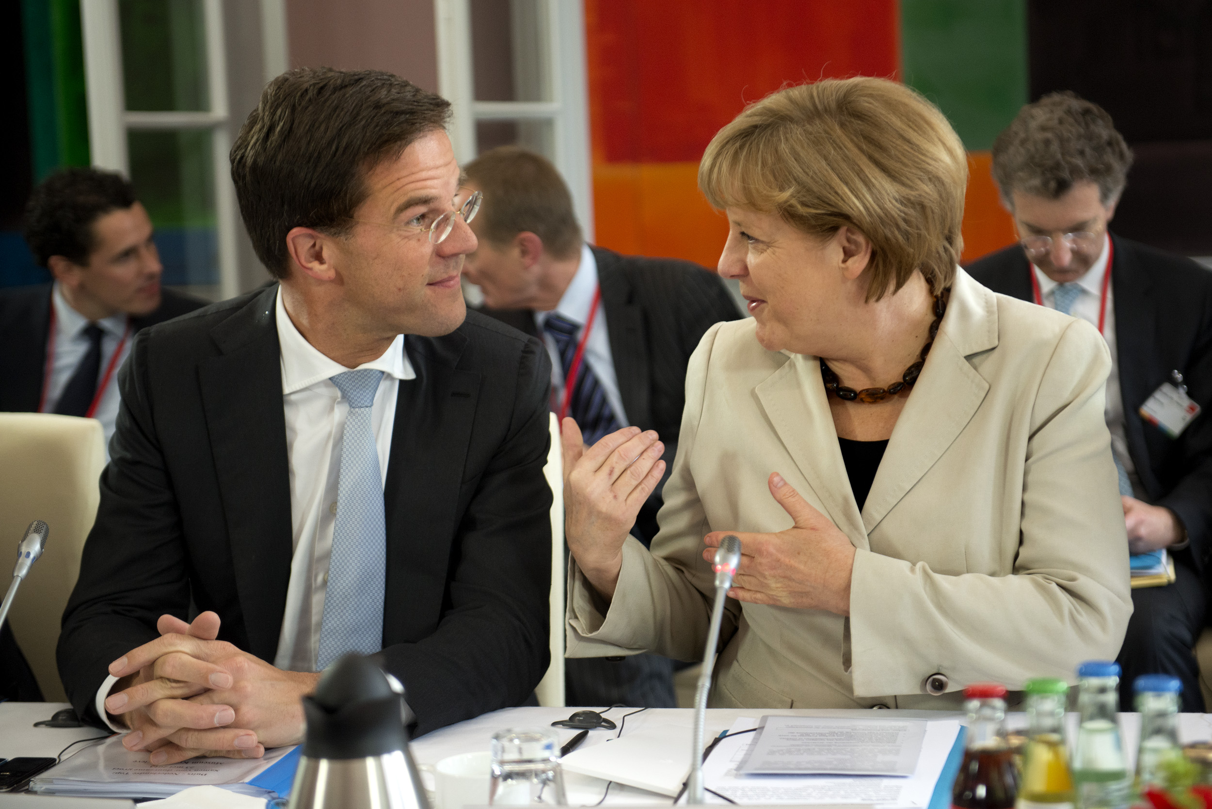 Rutte en Merkel tijdens het gezamenlijke ministersoverleg. De aanwezige bewindspersonen van de Duitse en Nederlandse regering zitten naast elkaar en niet tegenover elkaar. Deze tafelschikking benadrukt het gezamenlijke karakter van het overleg.